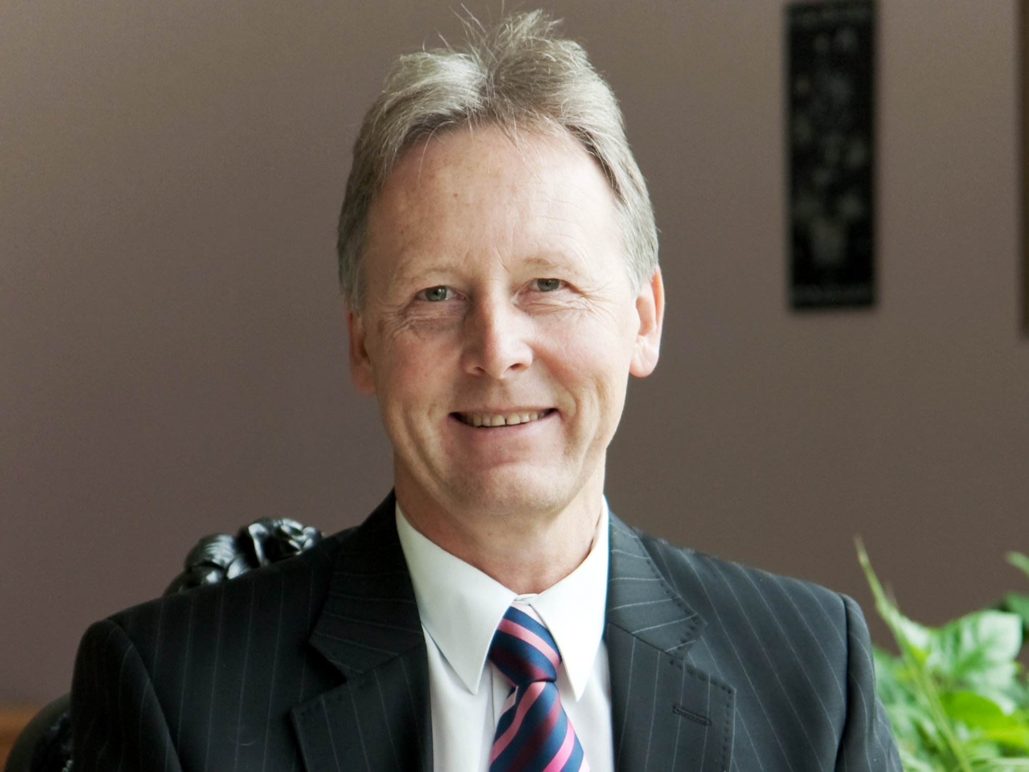 Sander Karu pilt